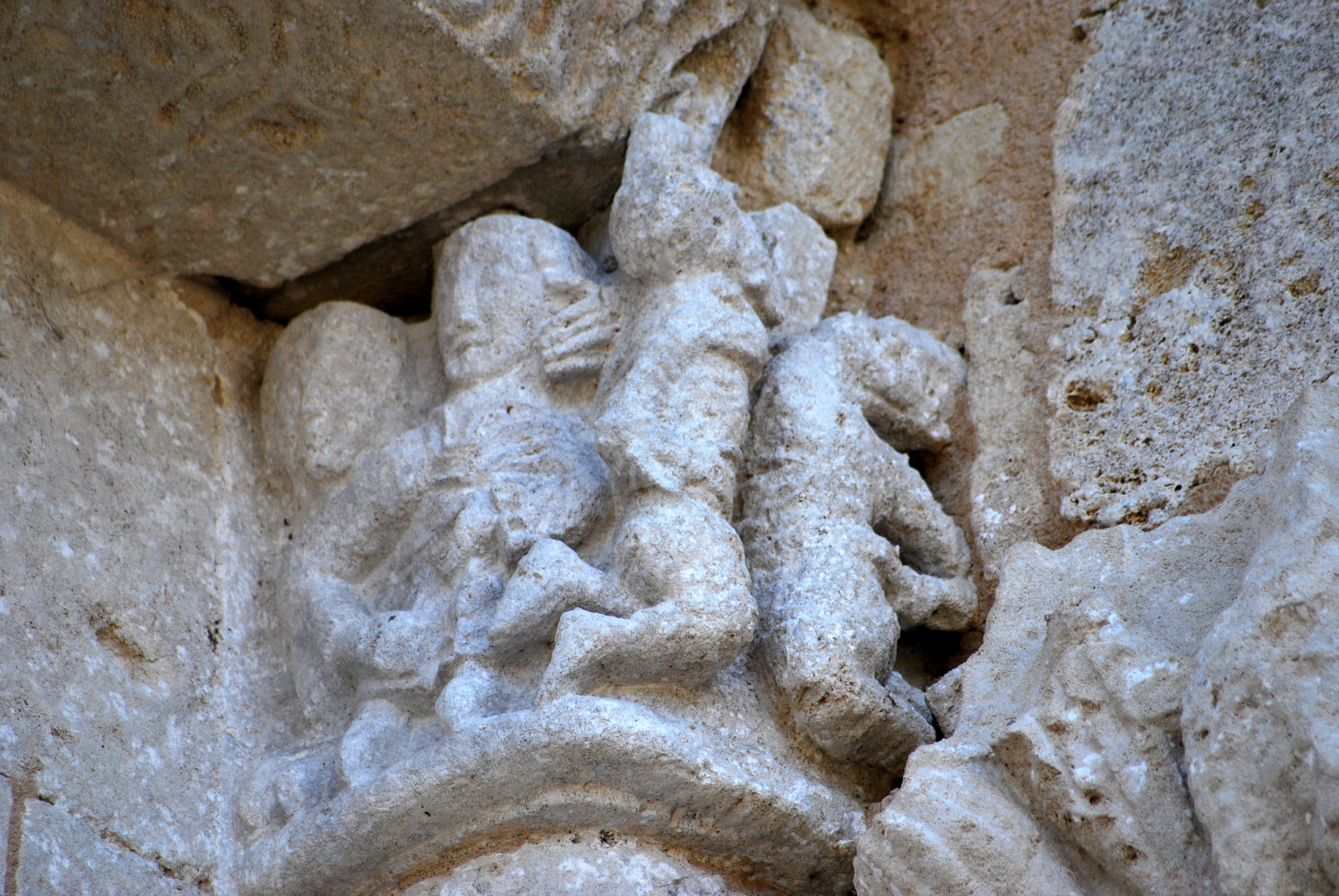 Église Saint-Quentin de Baron, Gironde